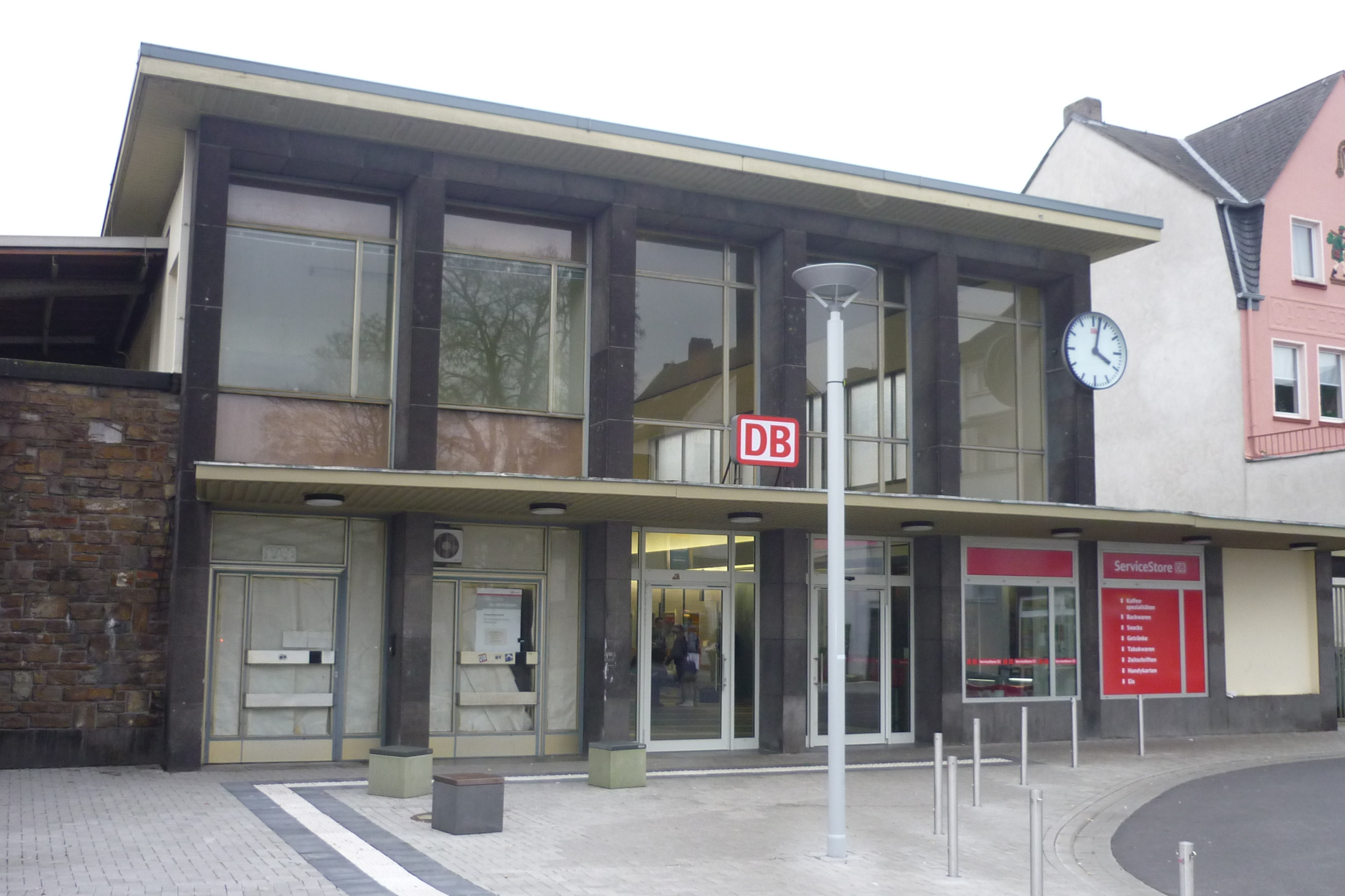 Bahnhofsgebäude von Andernach, erbaut 1956